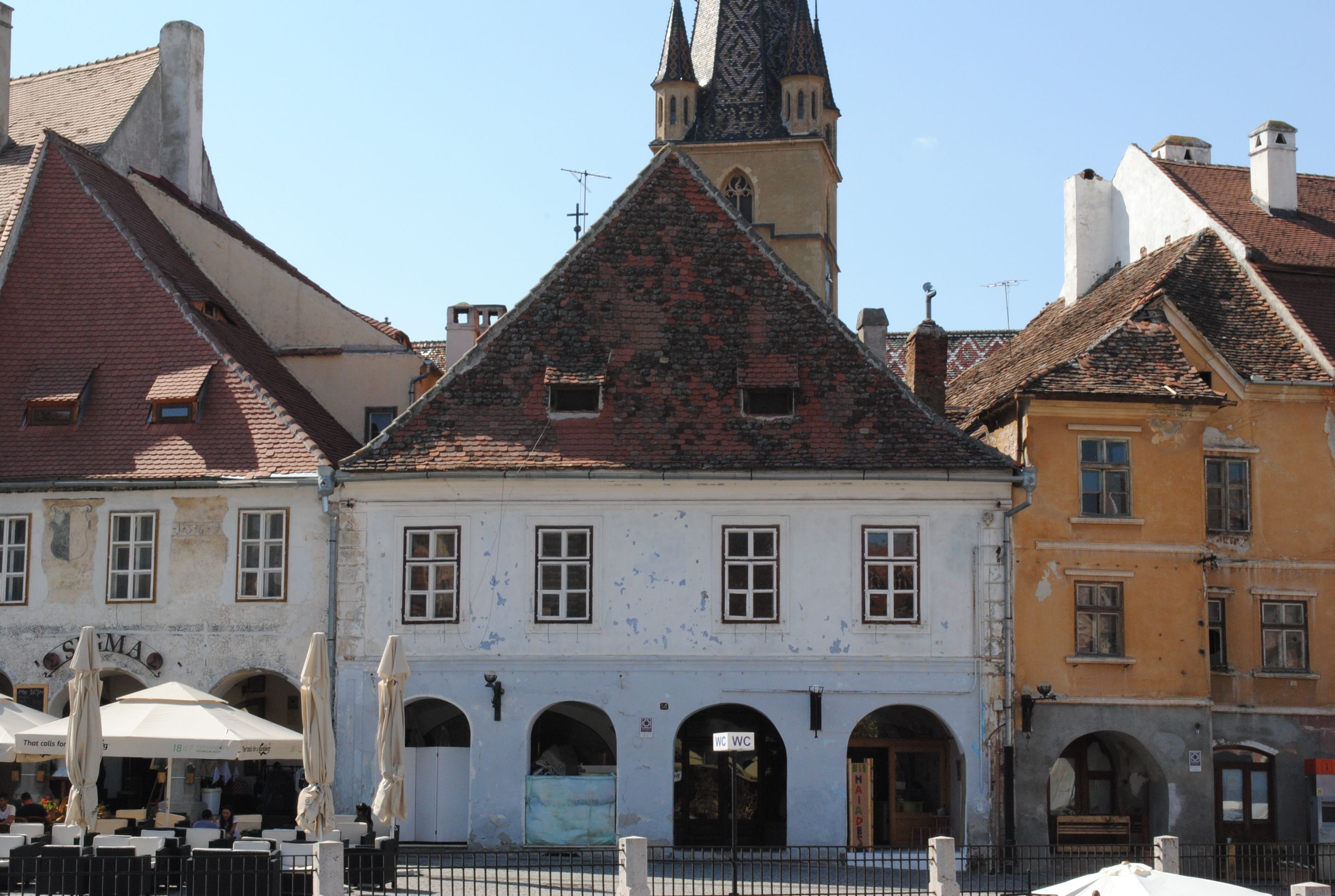 Casă, sec. XV - XVI, sf. sec. XVIII